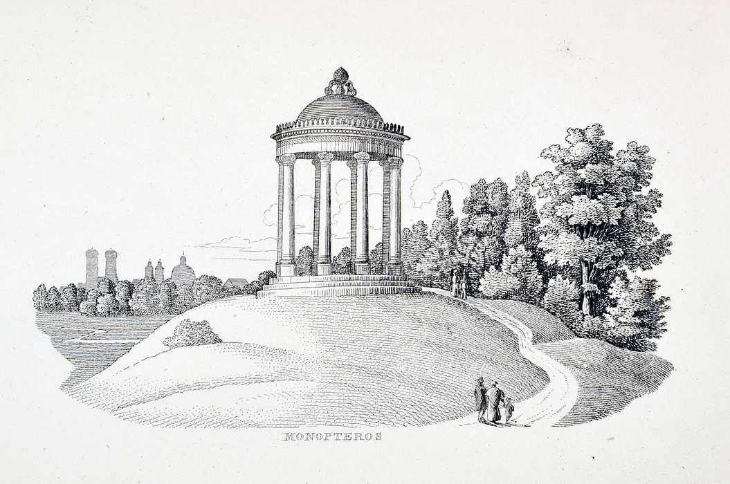 Monopteros im Englischen Garten, aus: Erinnerungen an München. München, Hochwind, o. J. [ca. 1840]). Steingravüre.